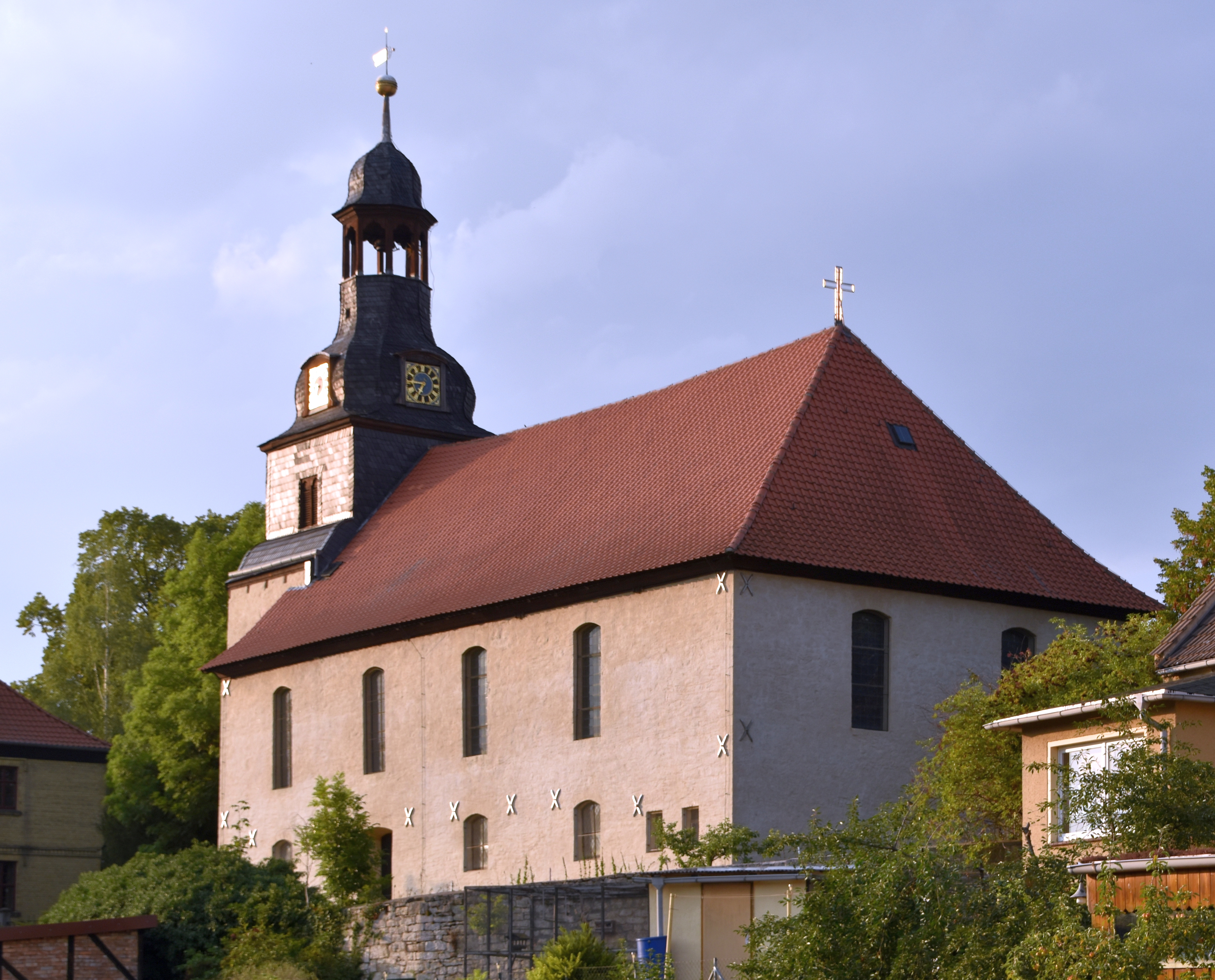 Kirche St. Petri Hausneindorf